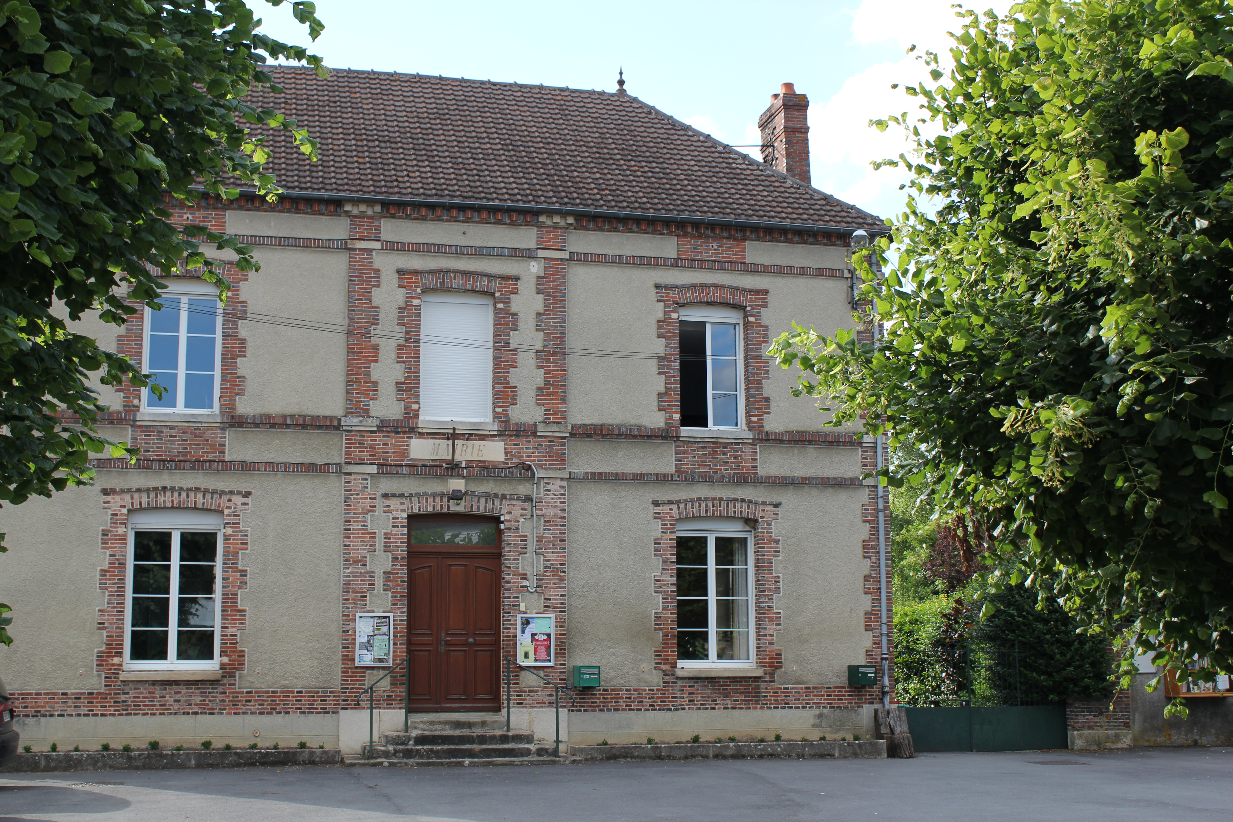 Mairie de la commune